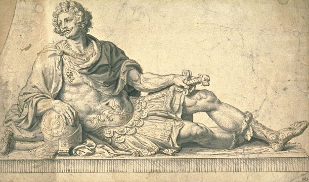 Design of the funeral monument to Henri II de Montmorency in Moulins